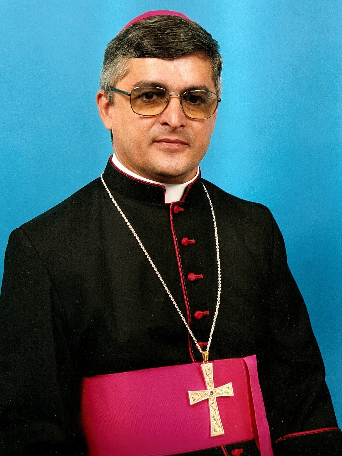 Foto tirada para a sua ordenação episcopal.